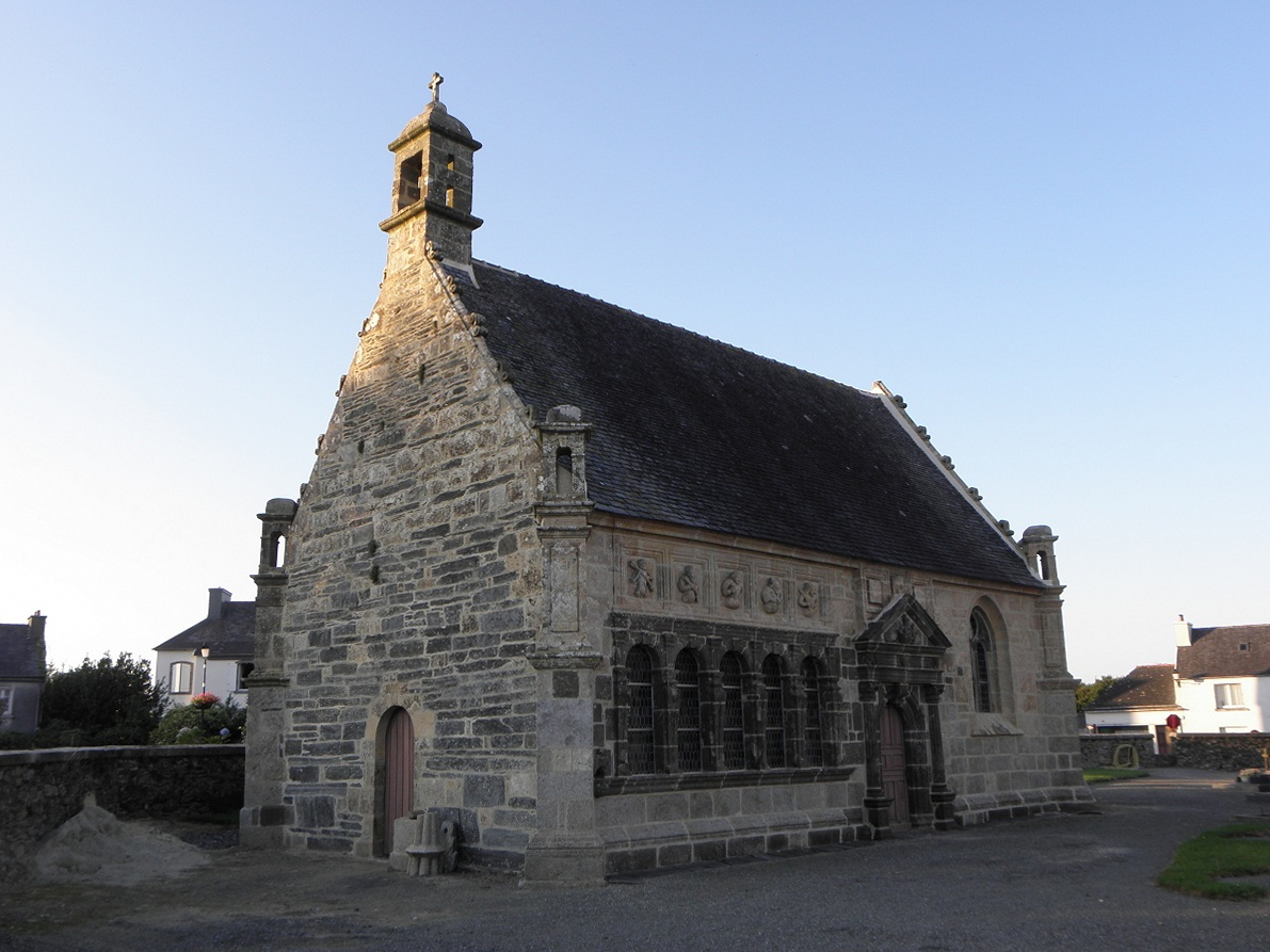 Vue d'ensemble de l'ossuaire de Ploudiry (29) datant de 1635.